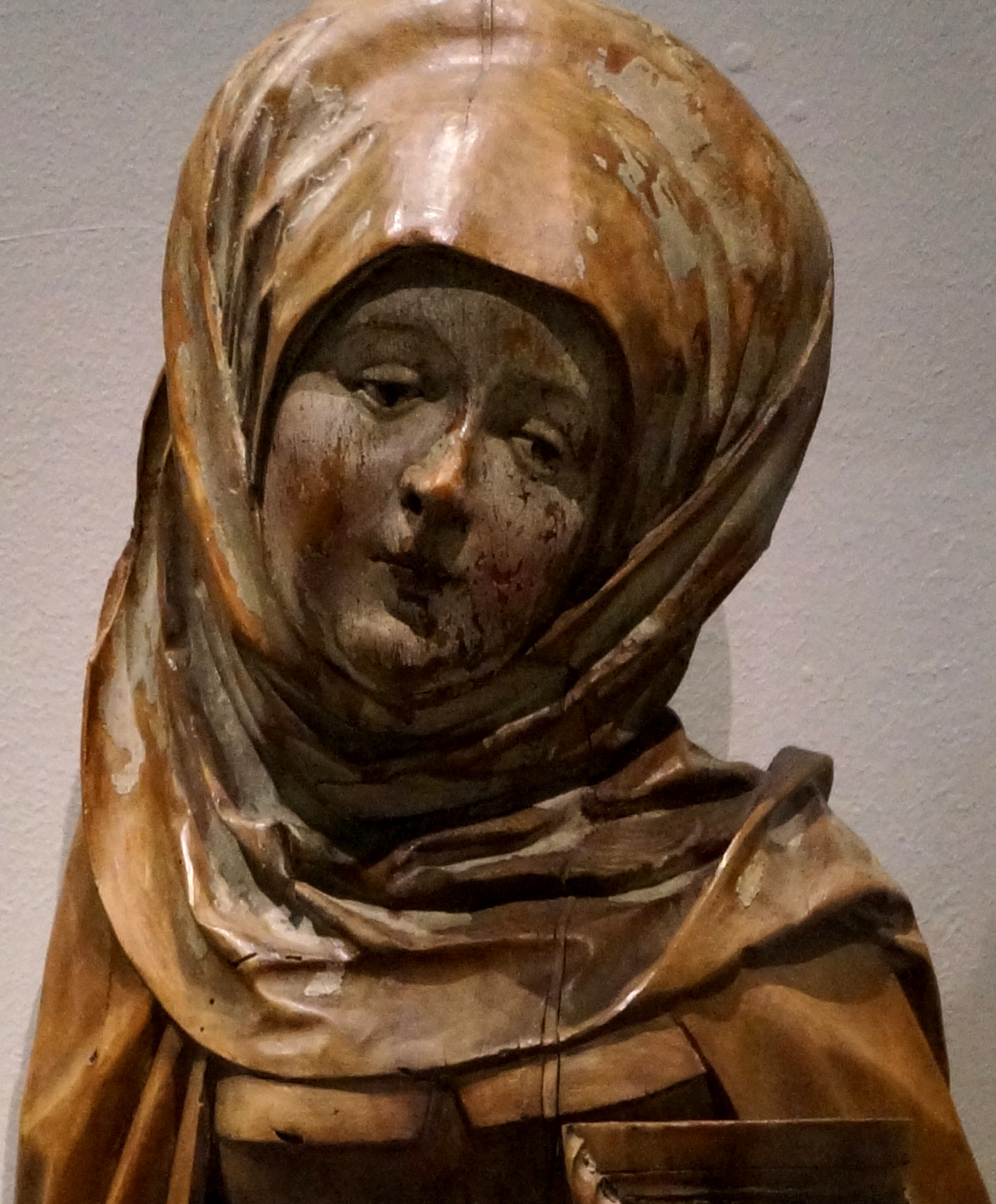 présenté lors de l'expo Sculptures souabes de la fin du moyen âge.